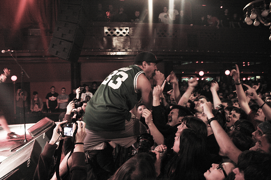 A Wilhelm Scream en la Sala Apolo, Barcelona, España. Fotos: Xavi Pedret. Puedes leer la crónica del concierto aqui!